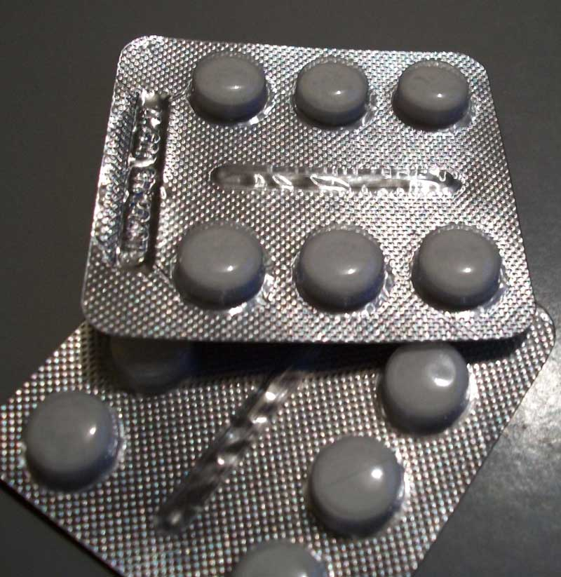 Comprimidos de nimesulida 100 mg.